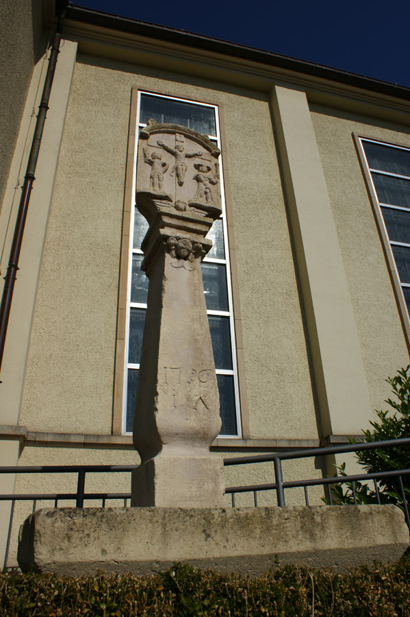 Kräiz bäi der Kierch zu Esch-Lalleng.